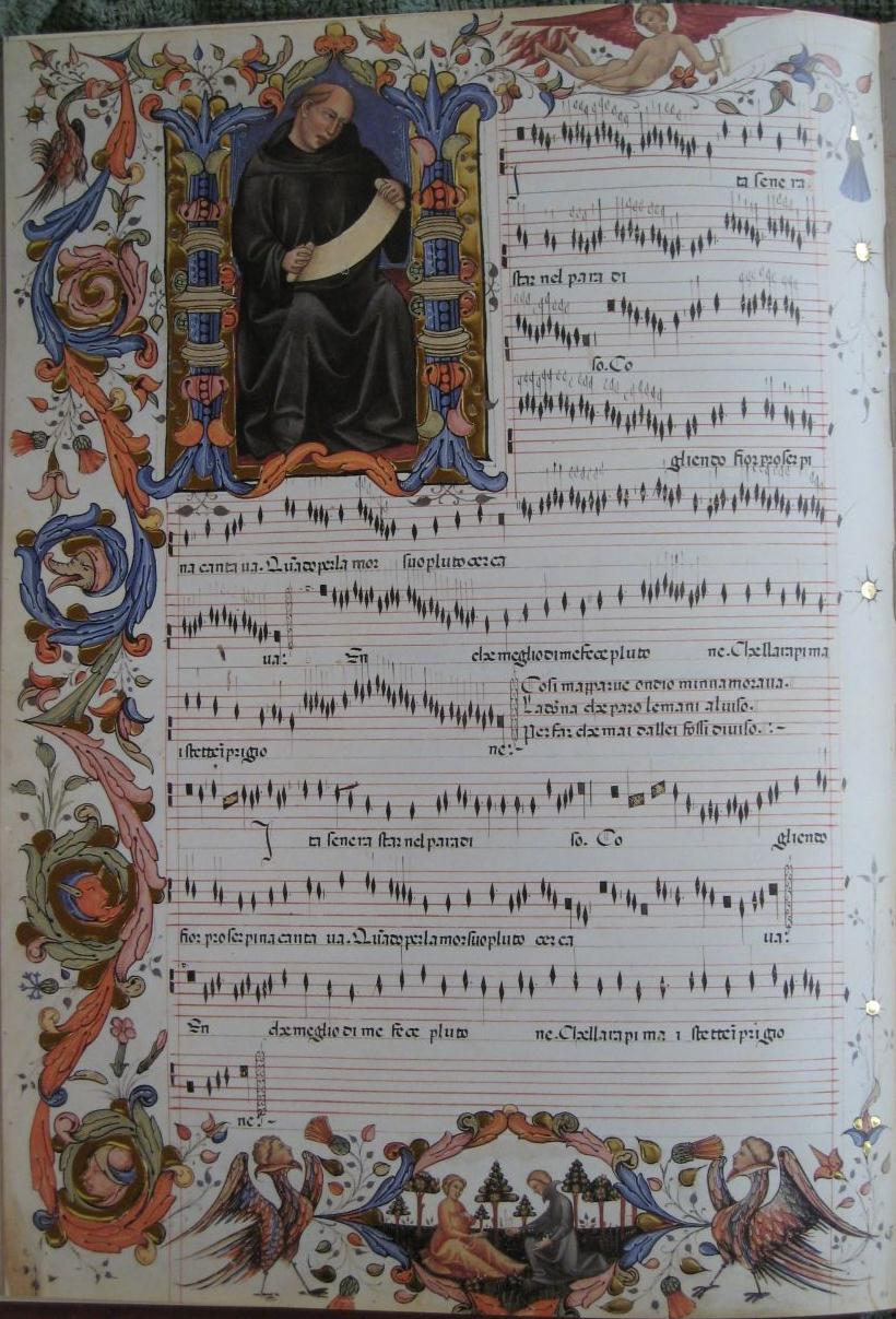 Ita se n'era star nel paradiso, Codex Squarcialupi